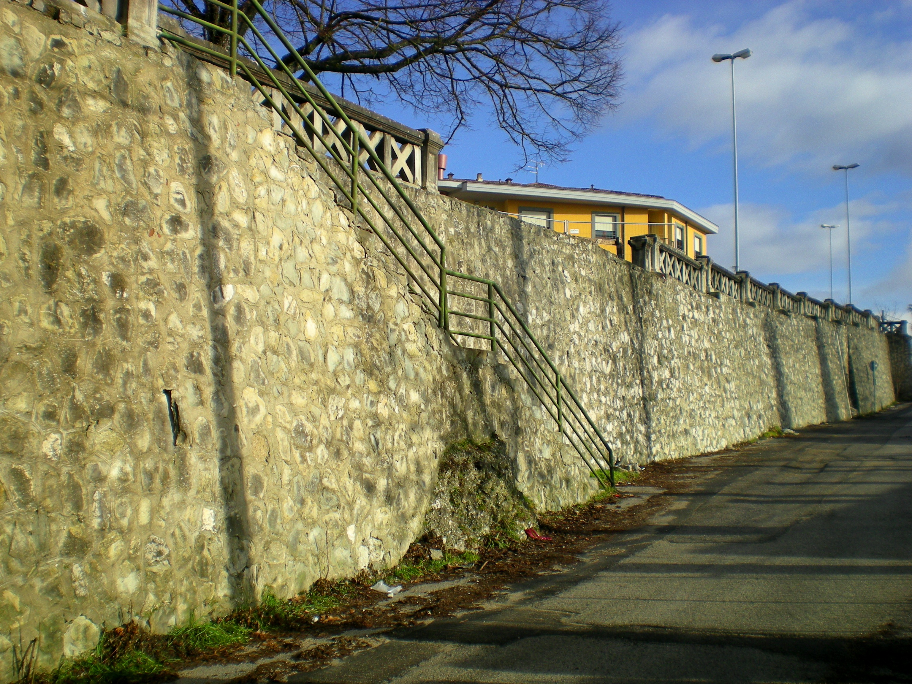 Mura dell'Aquila nei pressi di Porta Napoli